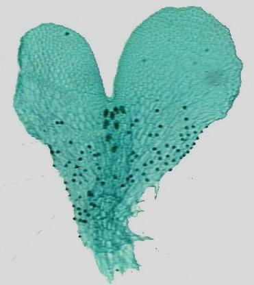 Gametofito a partir de esporas de helechos